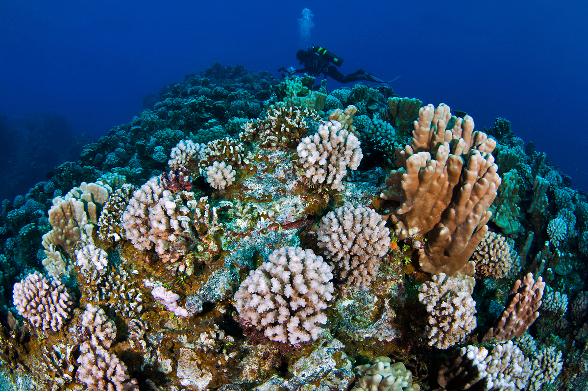 Fotos obtenidas durante la expedición que Oceana, National Geographic y la Armada de Chile realizaron en febrero al Parque Marino Motu Motiro Hiva.